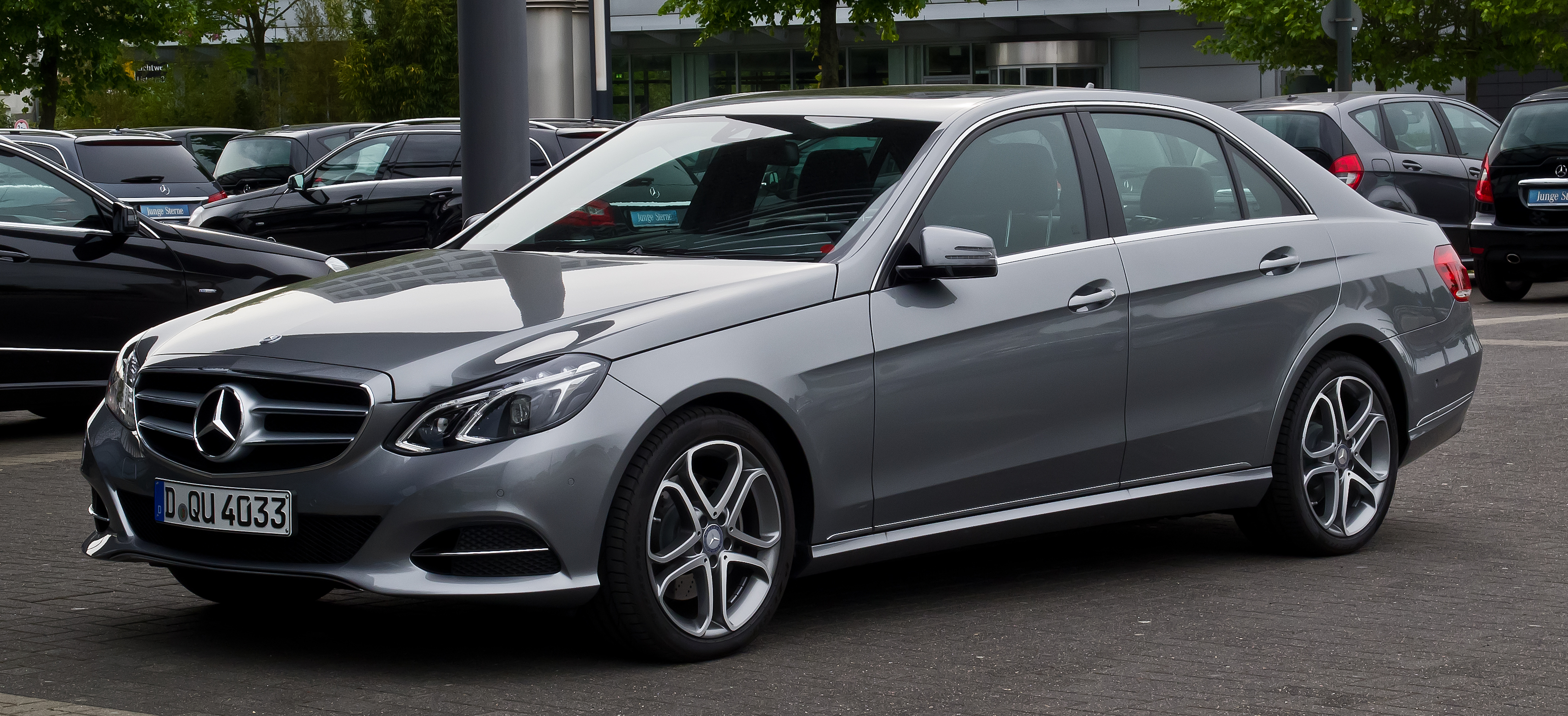 Mercedes-Benz E 200 CDI Avantgarde (W 212, Facelift)